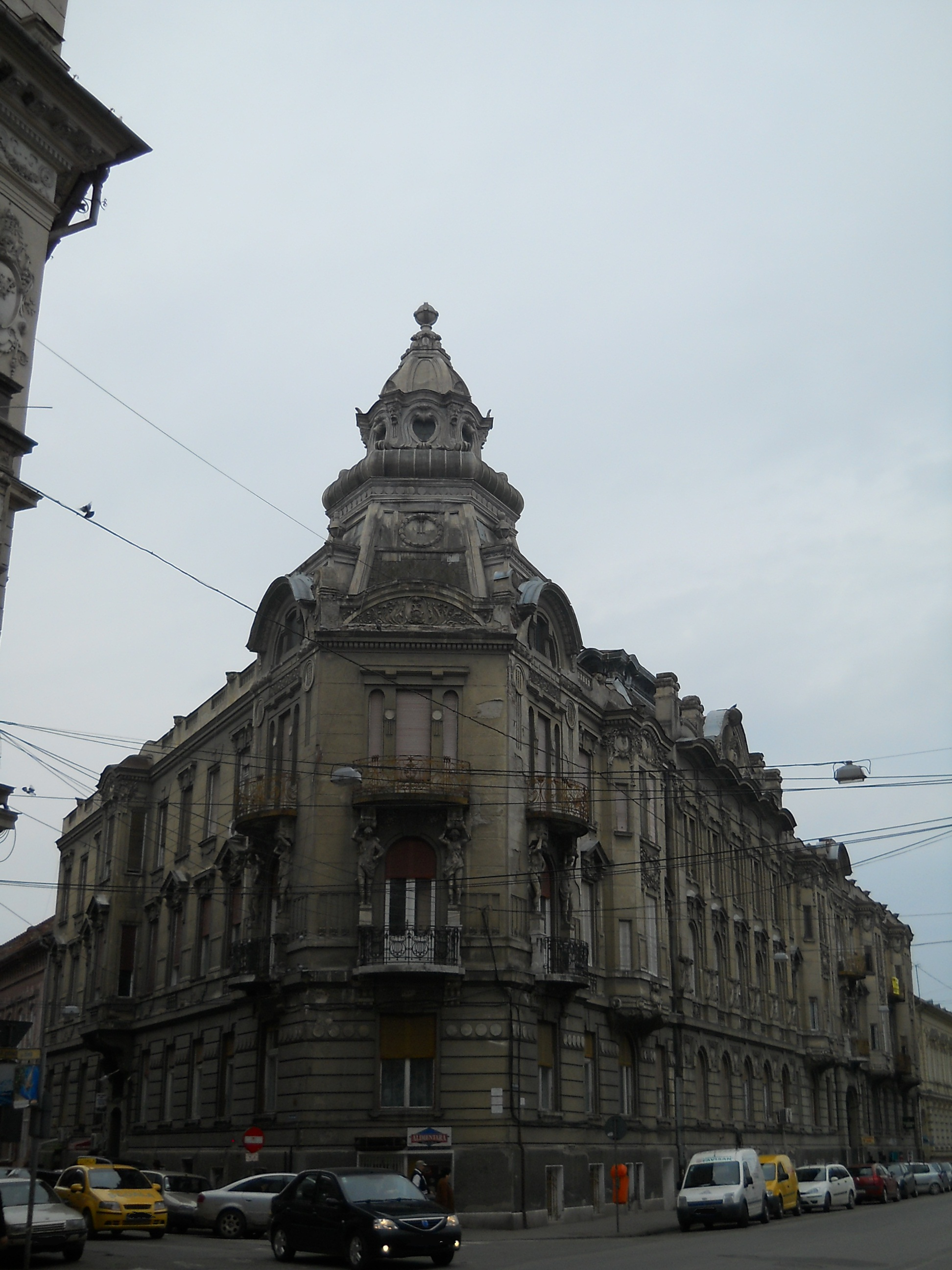 Privire de ansamblu asupra edificiului